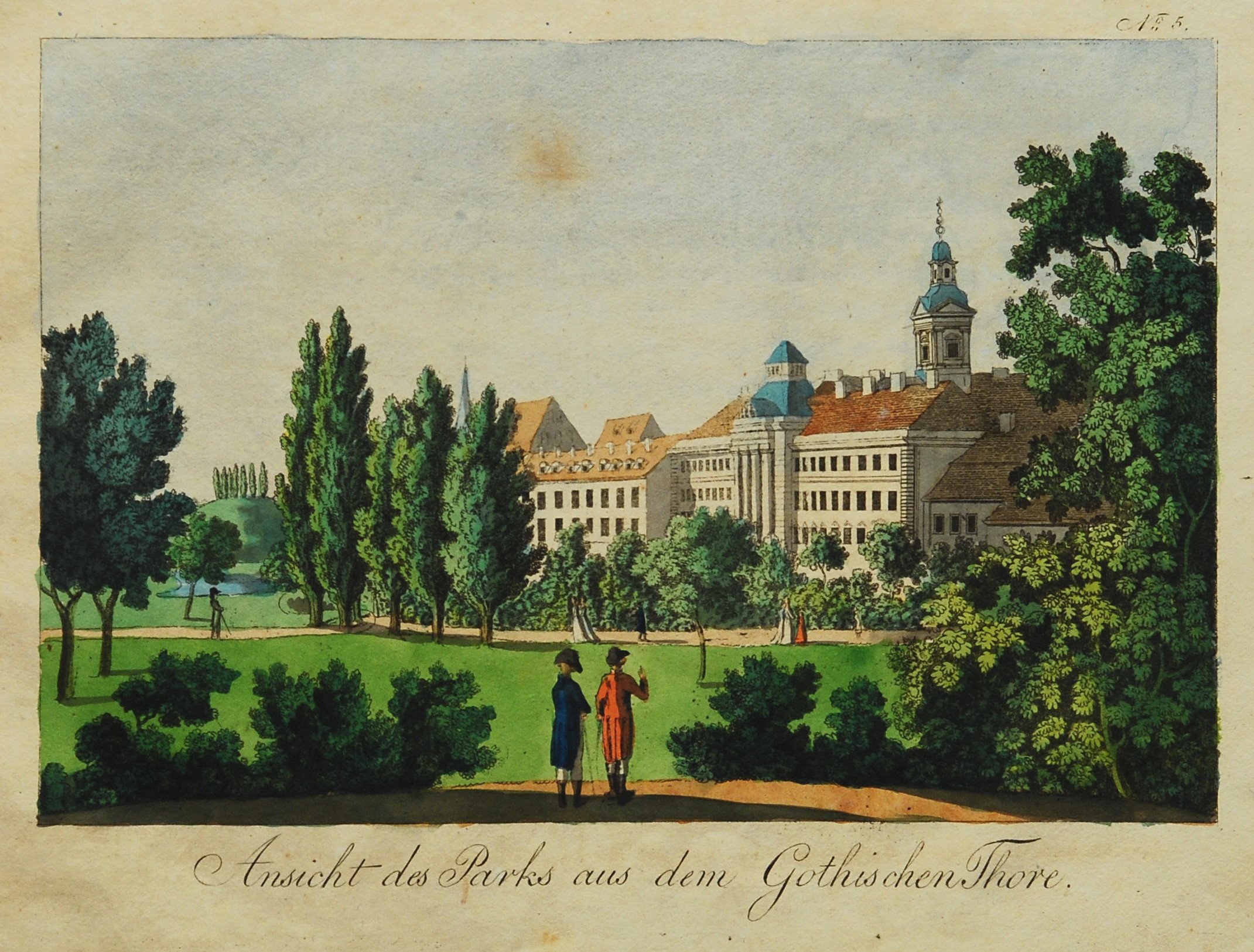 Leipzig 1804 Das Georgenhospital